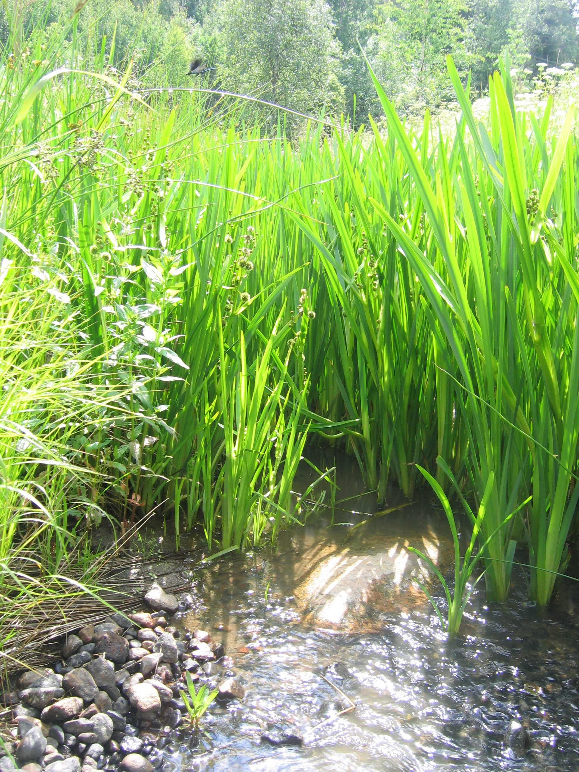 Kaislat